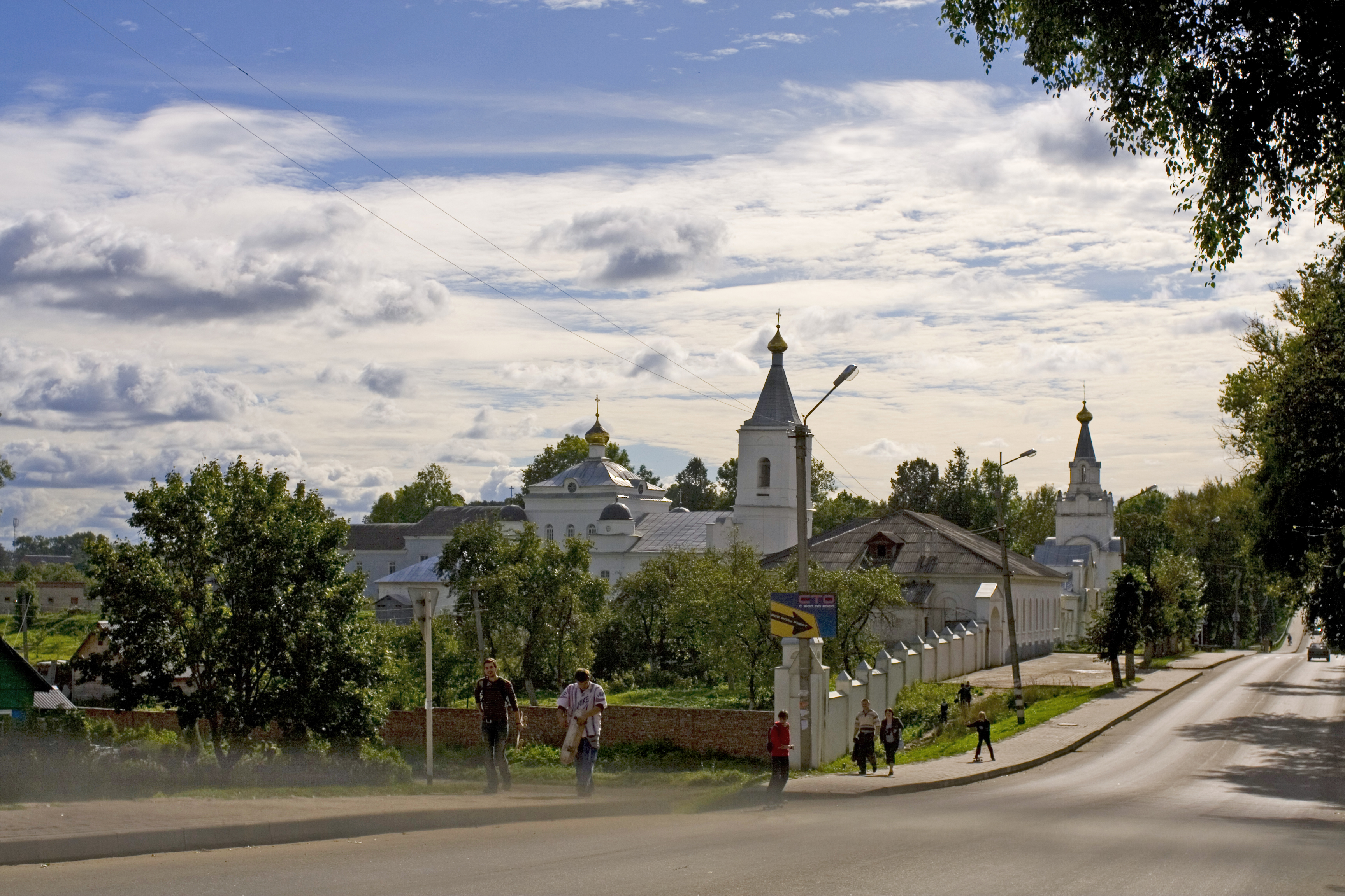 Спасо - Преображенский монастырь в Рославле